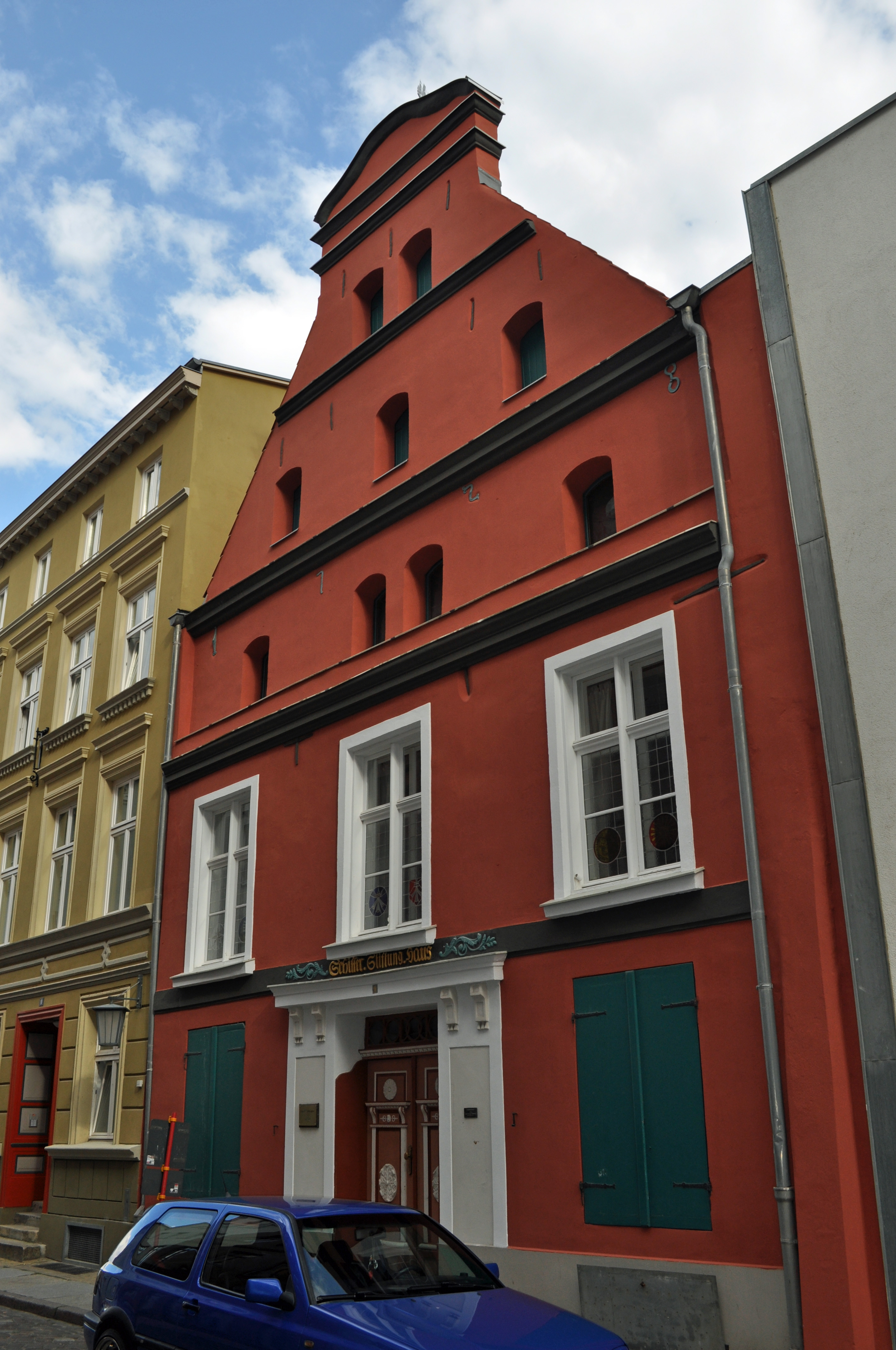 Das Foto zeigt ein Haus (bzw. Details des Hauses) in der Frankenstraße in Stralsund, Deutschland. Die Hausnummer steht im Dateinamen. Aufgenommen am 19. Juli 2011 vom Benutzer:Klugschnacker.